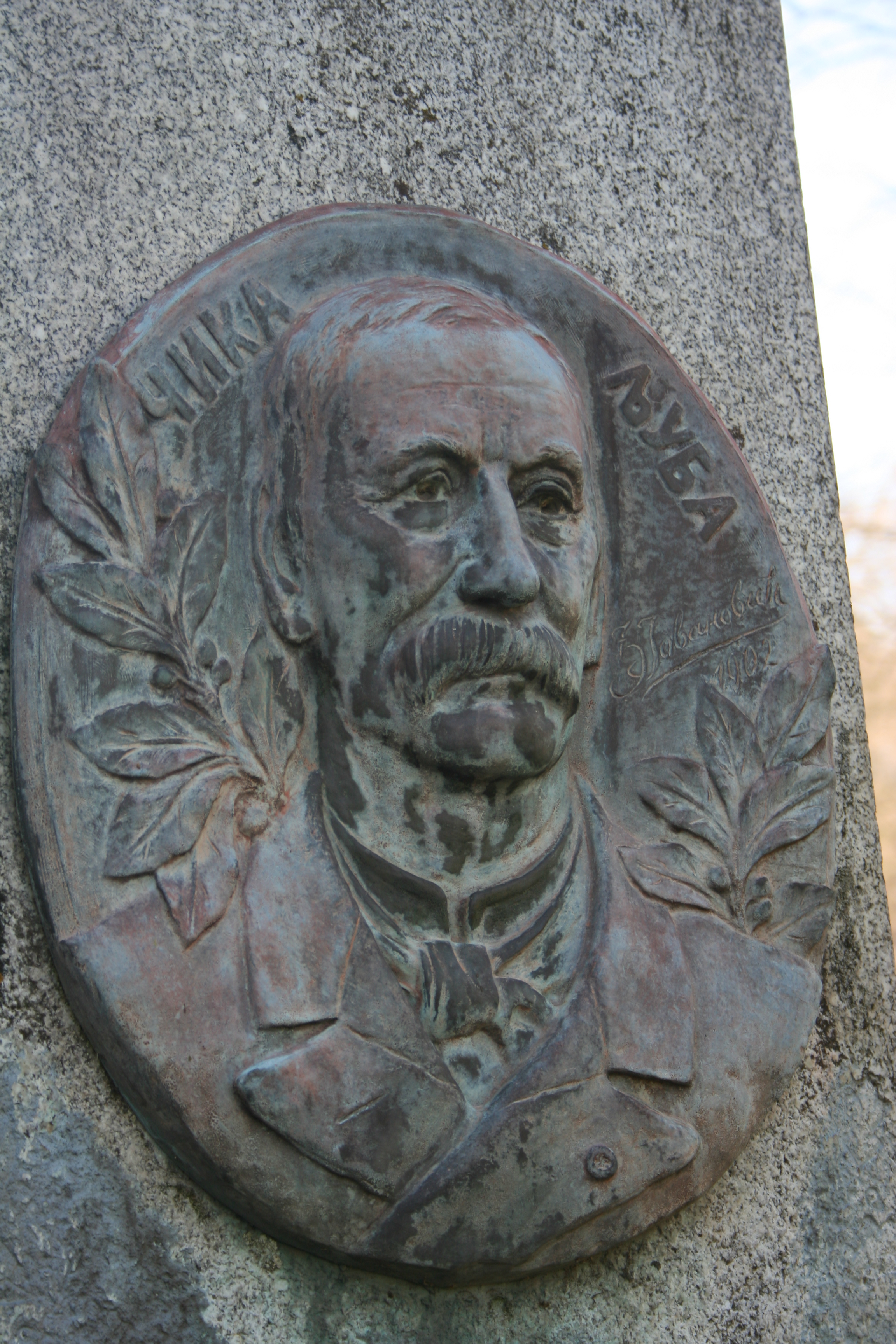 Grobovi Nenadovića u porti crkve, Brankovina